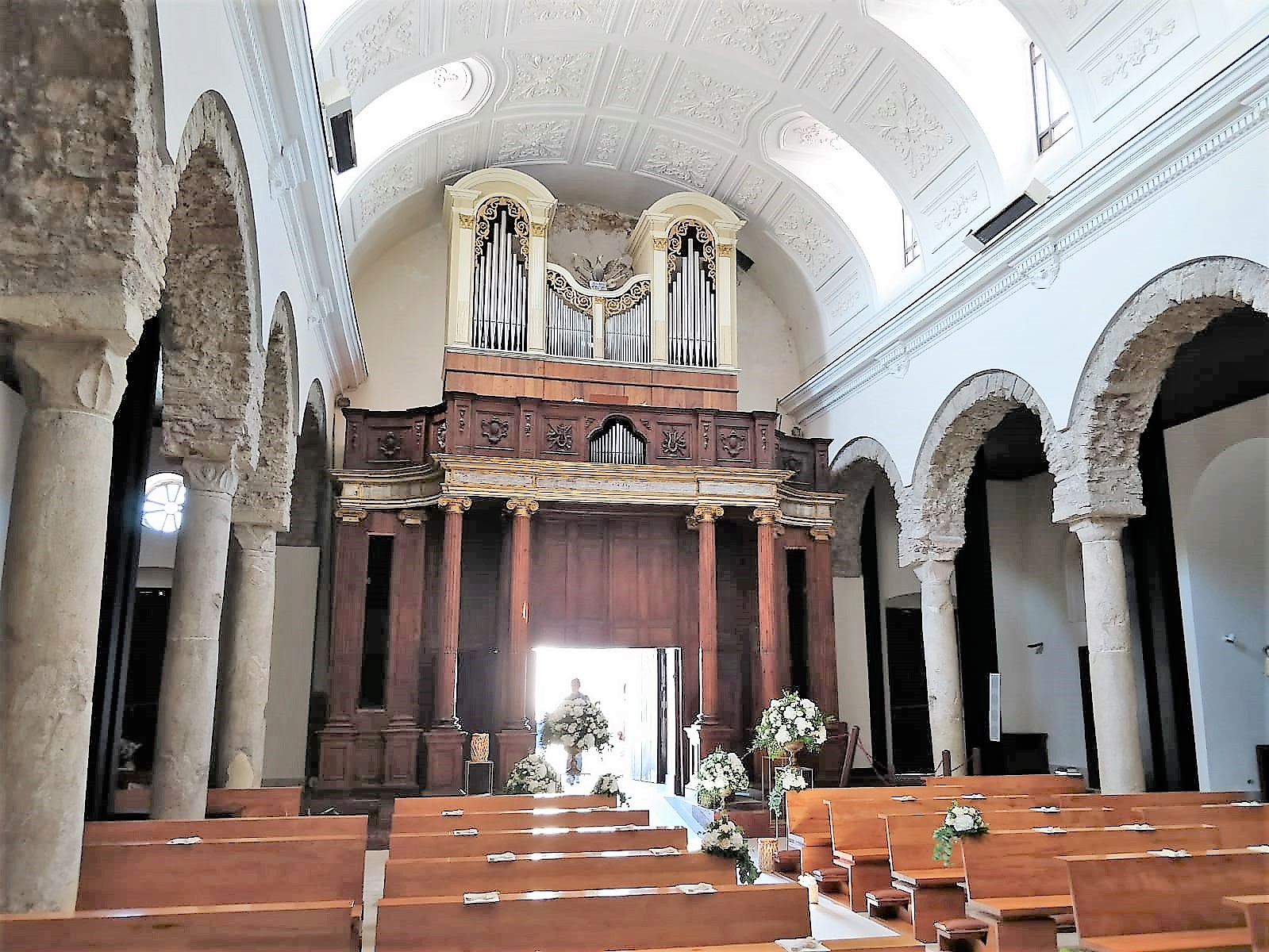 Controfacciata.